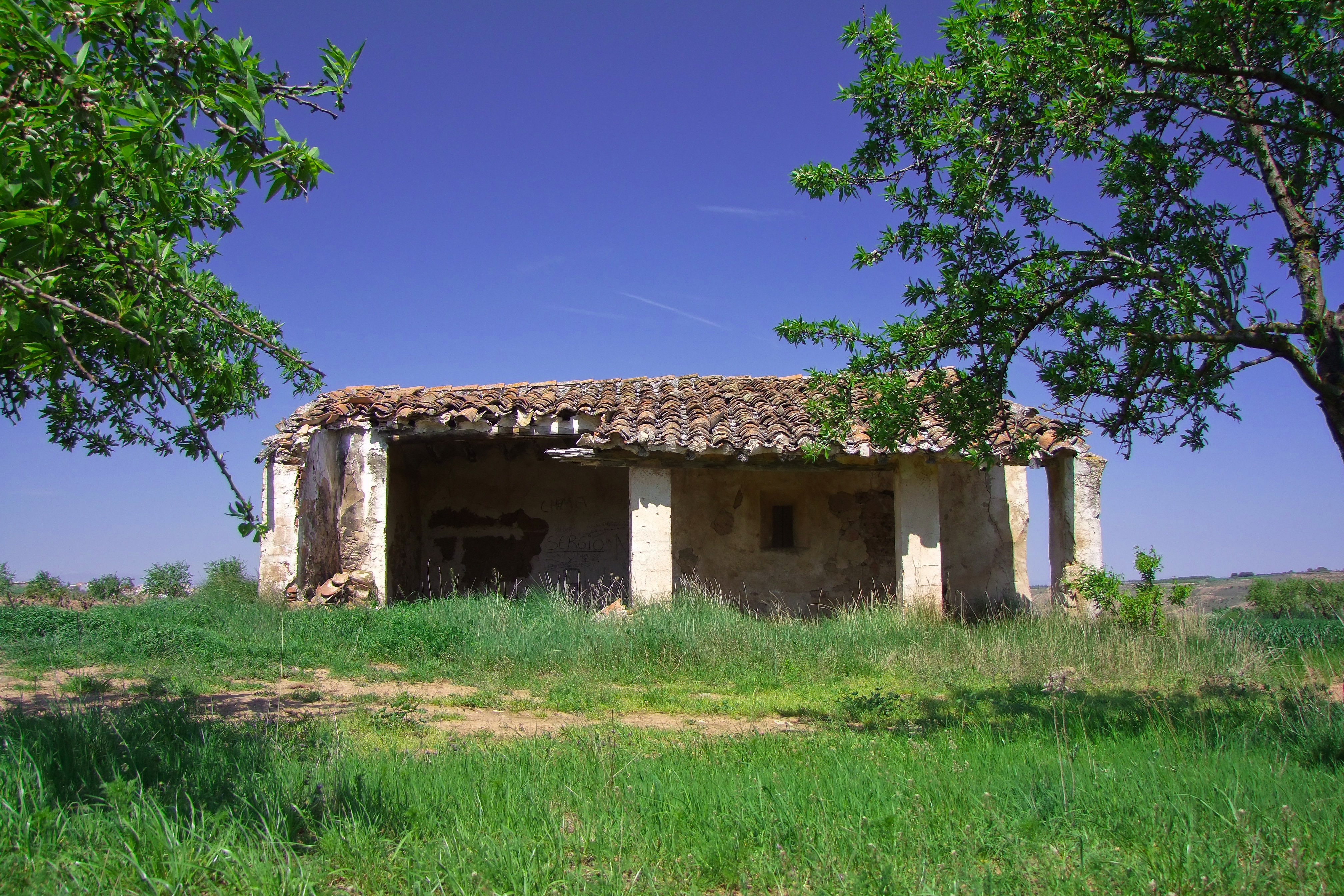 Ermita de Santa Juliana en la localidad de Ventas Blancas, La Rioja - España